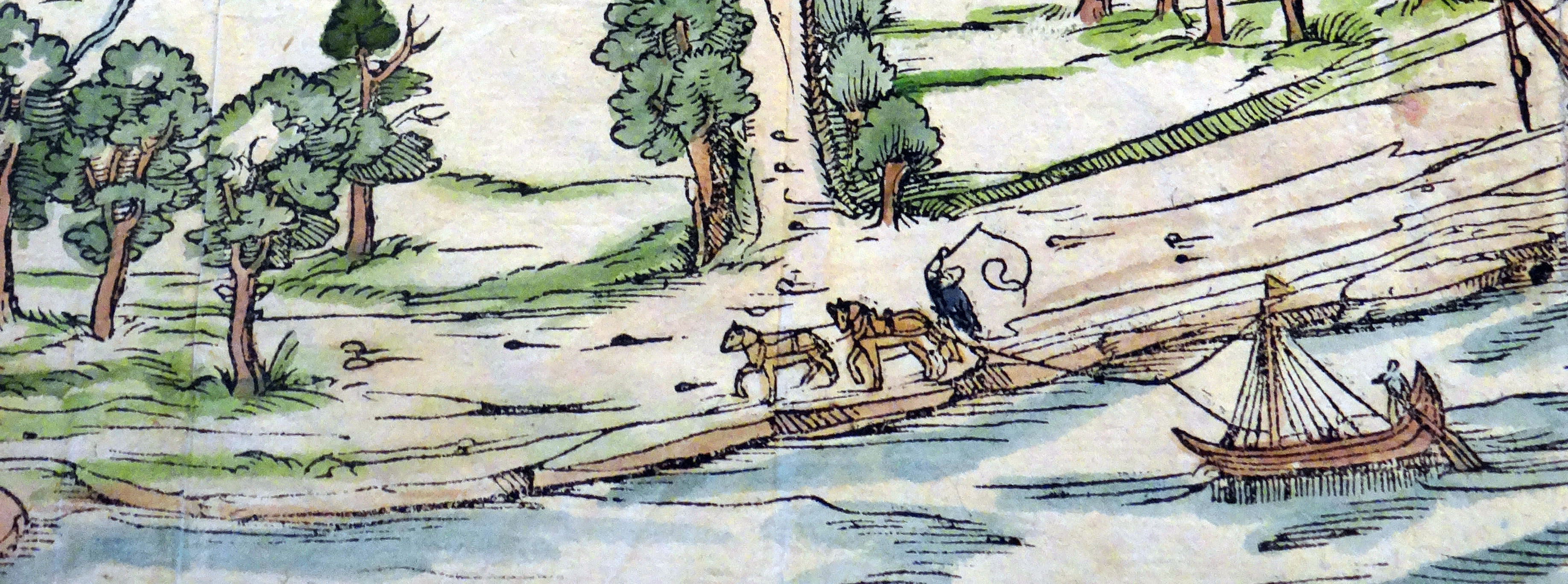 Treidelgespann am Rhein, 16. Jahrhundert. Detail aus: Sebastian Münster: Cosmographey. Hencicpetrina, Basel 1572, S. DCXCIII–DCXCVI. Stadtarchiv Worms: Abt. 217 Nr. 1478.